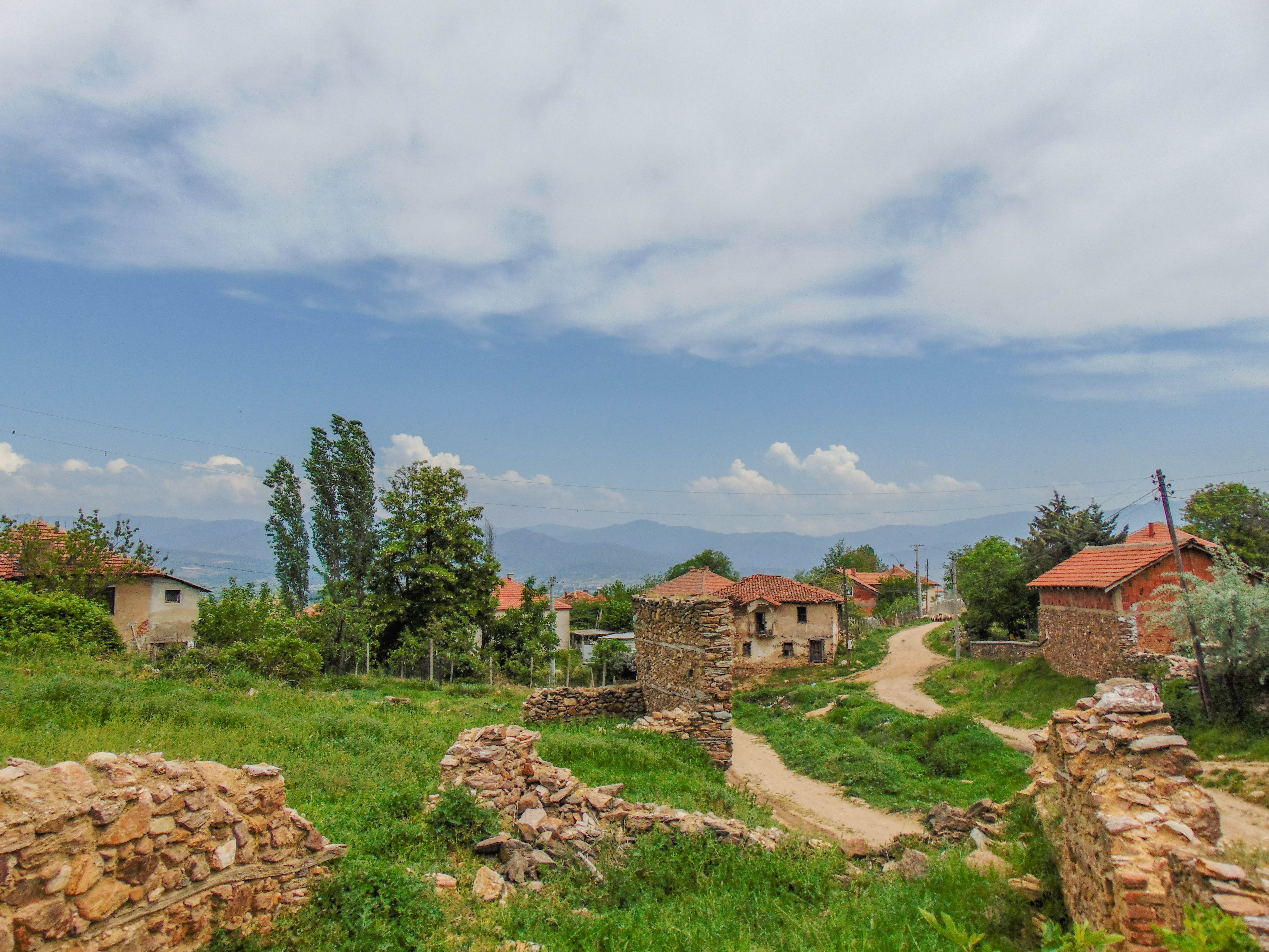 Воиславци